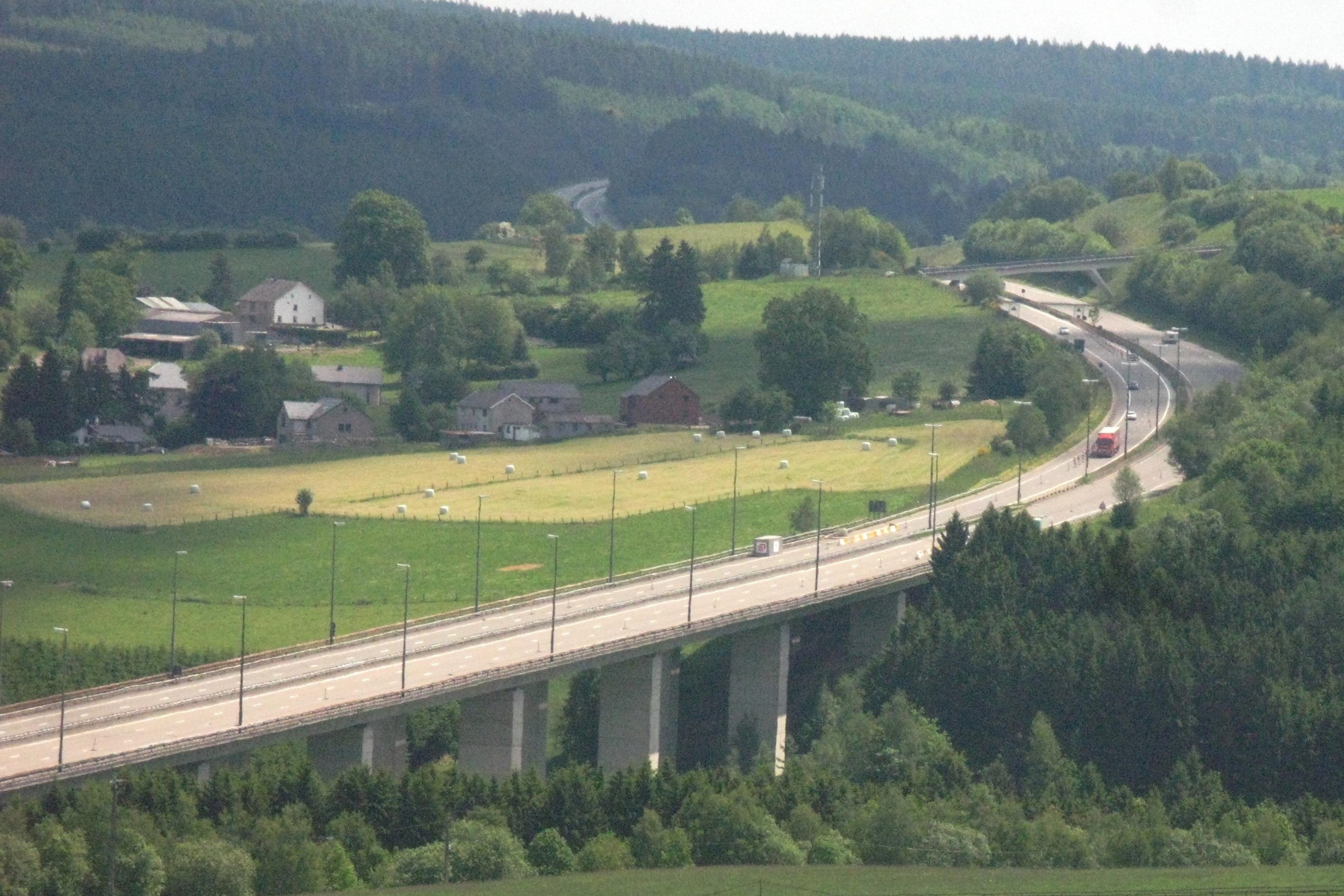 D' E421 / E42 / A27 op dem Viaduc du Recht um p.k. 40 vun der A27.